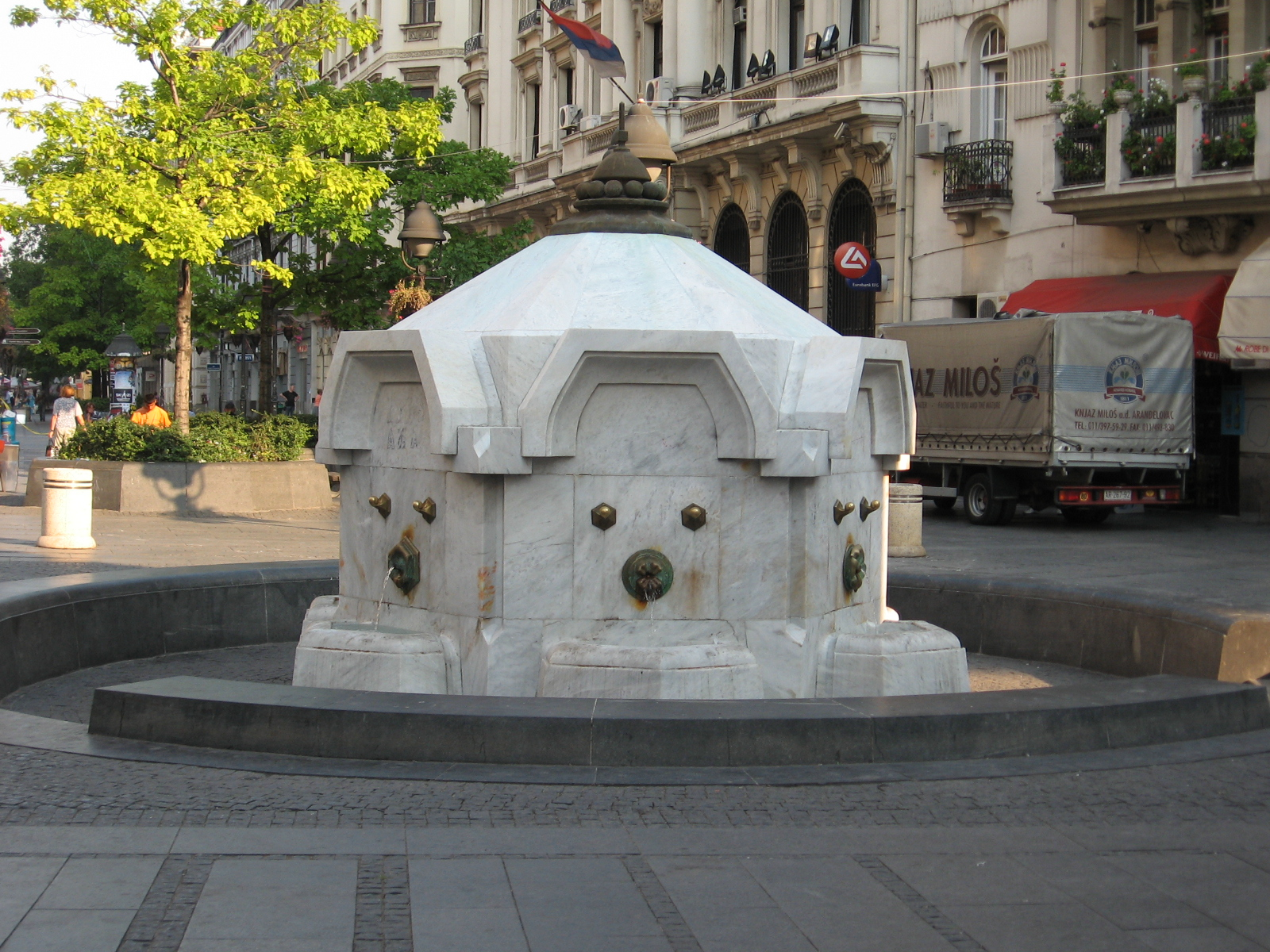 Delijska česma (fountain), Ulica Knez Mihailova, Belgrade